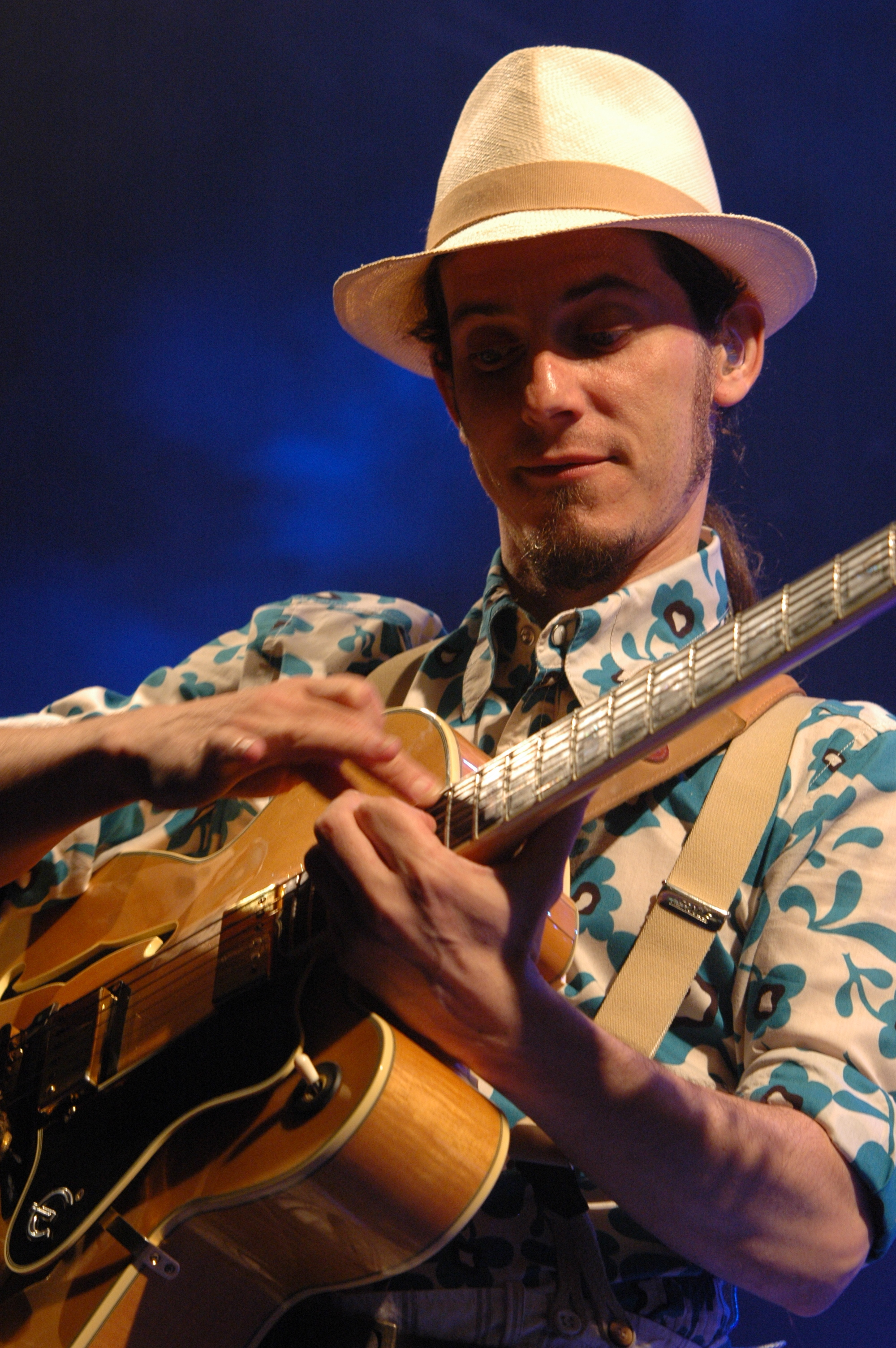 Manu Eveno avec le groupe Tryo au festival Pinède Gould de Juan les Pins le 26/07/07.